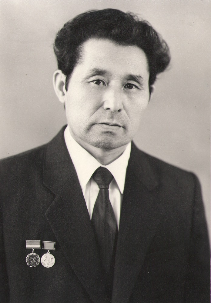 архитектор Капанов Адамбек Кадырбекович